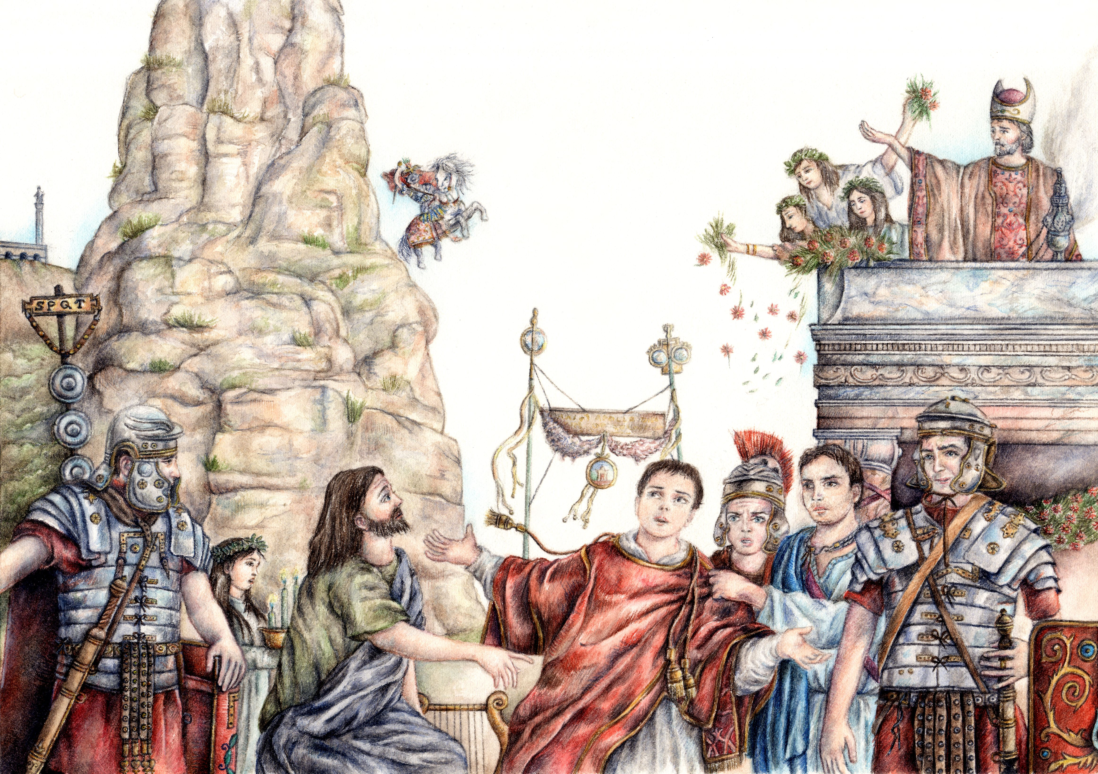 San Cesario diacono si imbatte in un giovane di nome Luciano, destinato a essere sacrificato ad Apollo per la festa del primo gennaio. Cesario protesta per questa barbarie presso il sacerdote pagano Firmino, incaricato del sacrificio umano, che per tutta risposta lo fa arrestare. Sullo sfondo vi è il "Pisco Montano", uno sperone roccioso di 83 metri che costituisce una struttura geologica a sé in quanto non è inglobato al retrostante Monte Sant'Angelo, sulla cui vetta domina il tempio attribuito a Giove Anxur.